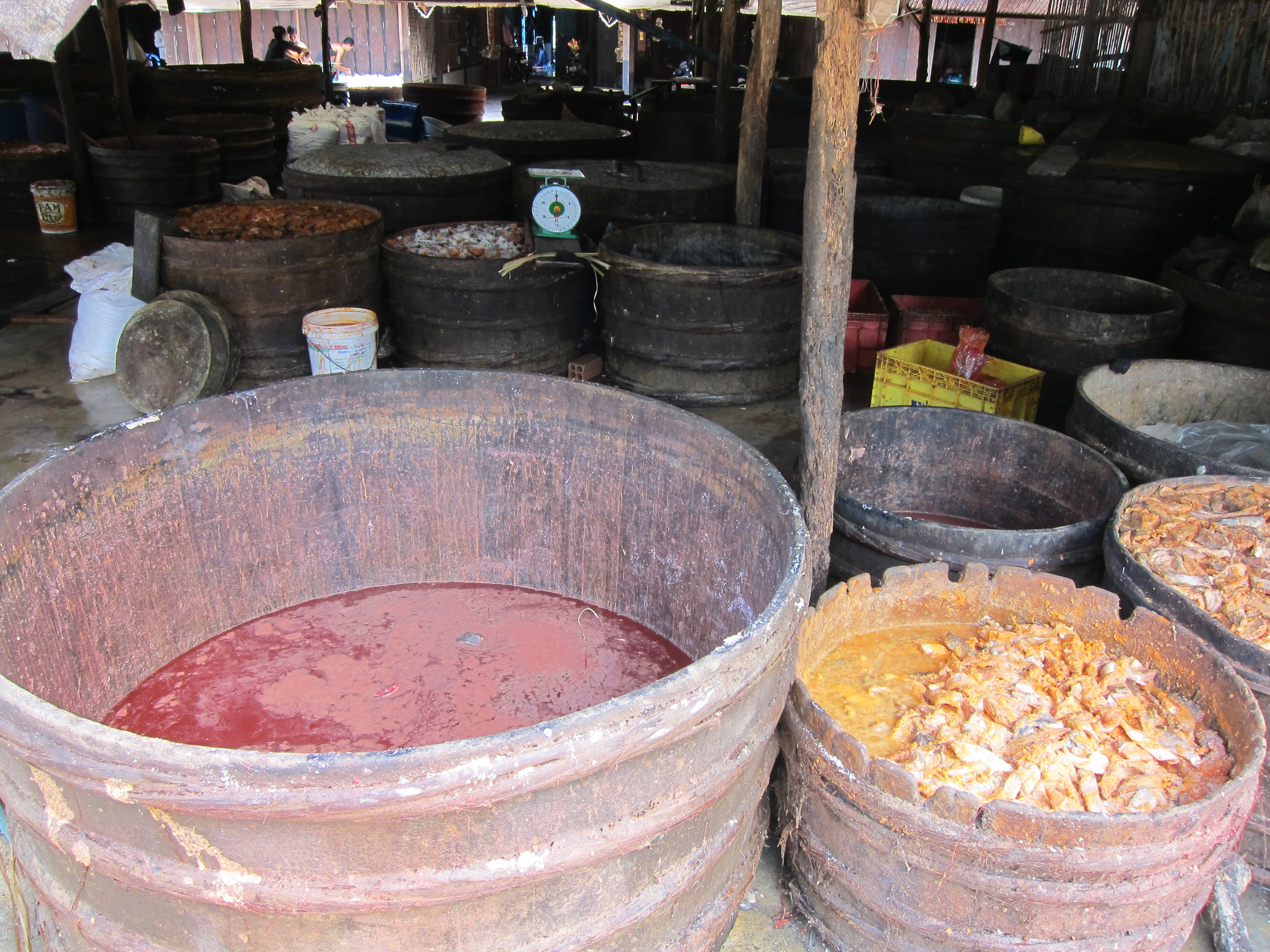 Visiting Battambang, Cambodia SouksaBike Tour.